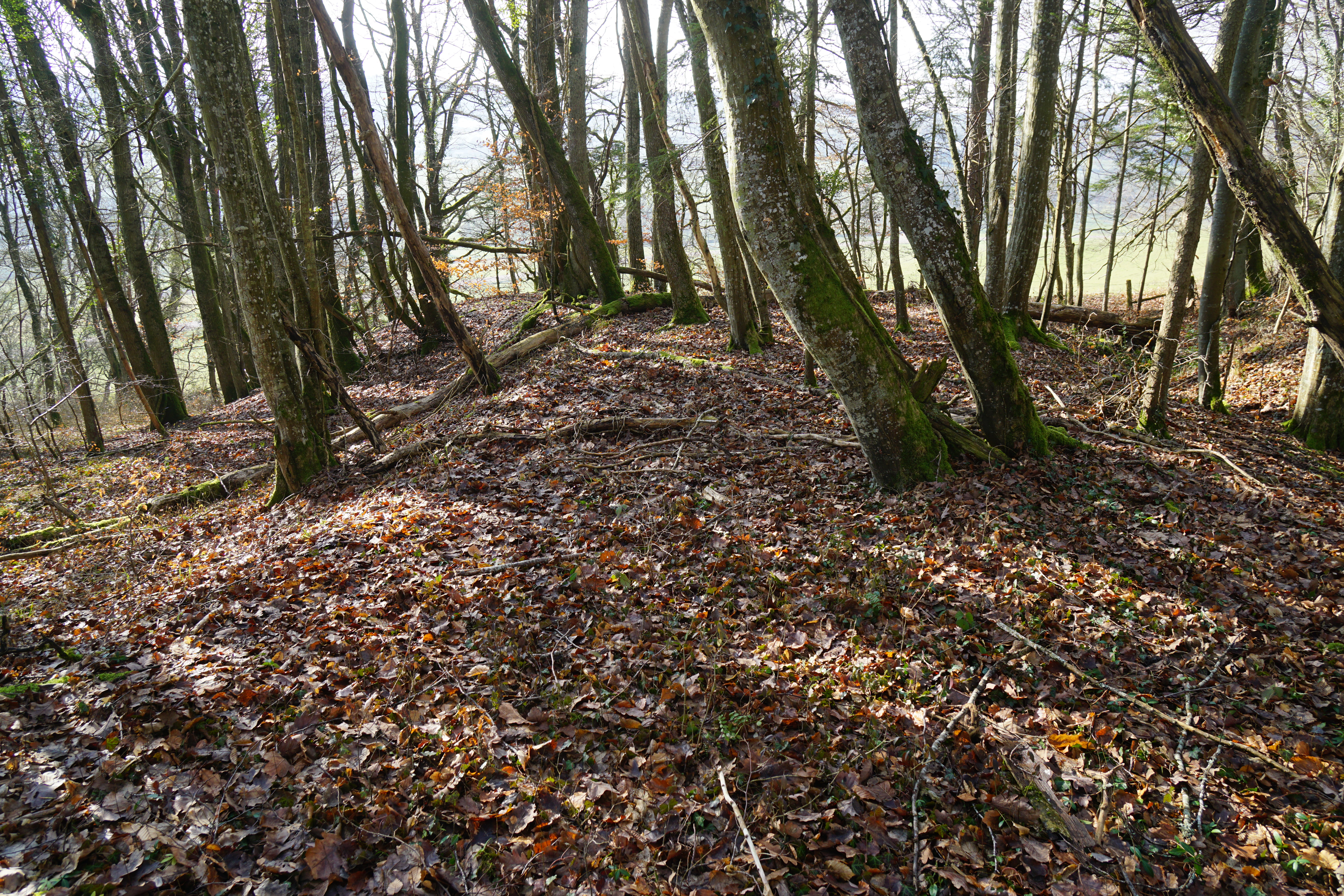 Terril du puits situé au Nord de La Rouillie (concession de la Vacheresse).